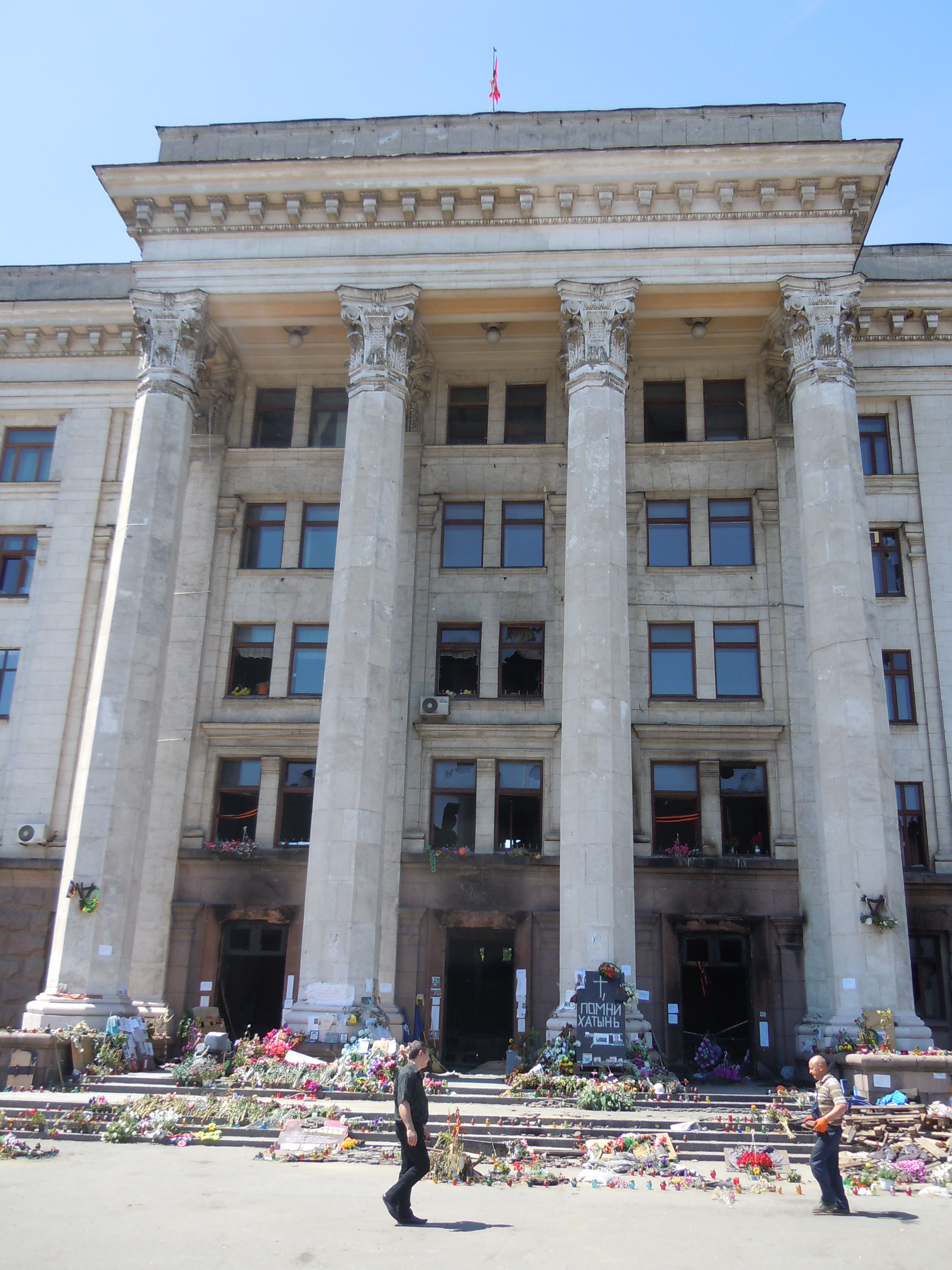 Будинок профспілок Одеської області після пожежі, Одеса, Куликове поле, 1